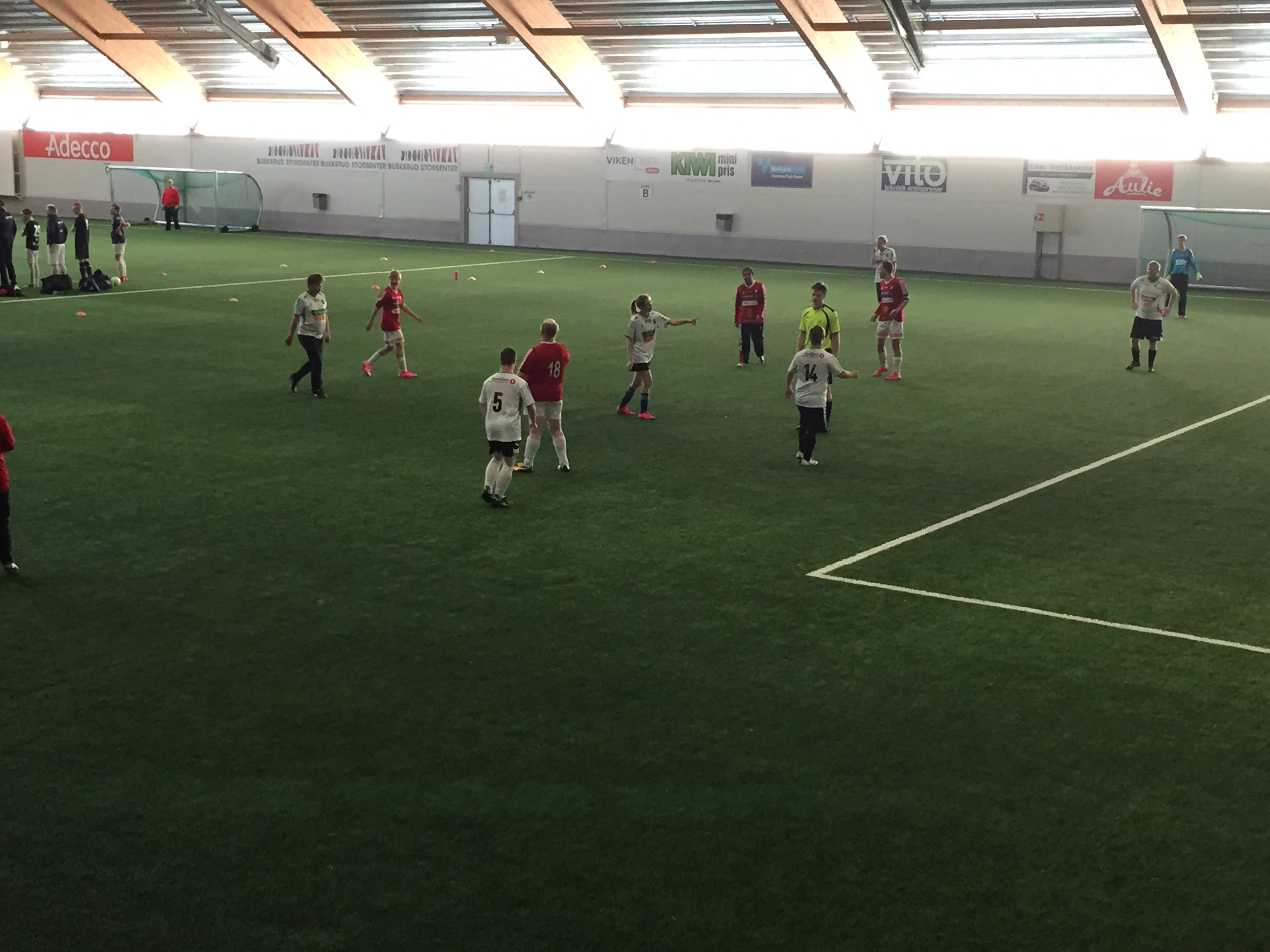 Hønefoss BK har flere FFU-lag (Fotball For Utviklingshemmede), bildet viser HBK Tigers under en cup i Mjøndalen 30. oktober 2016.